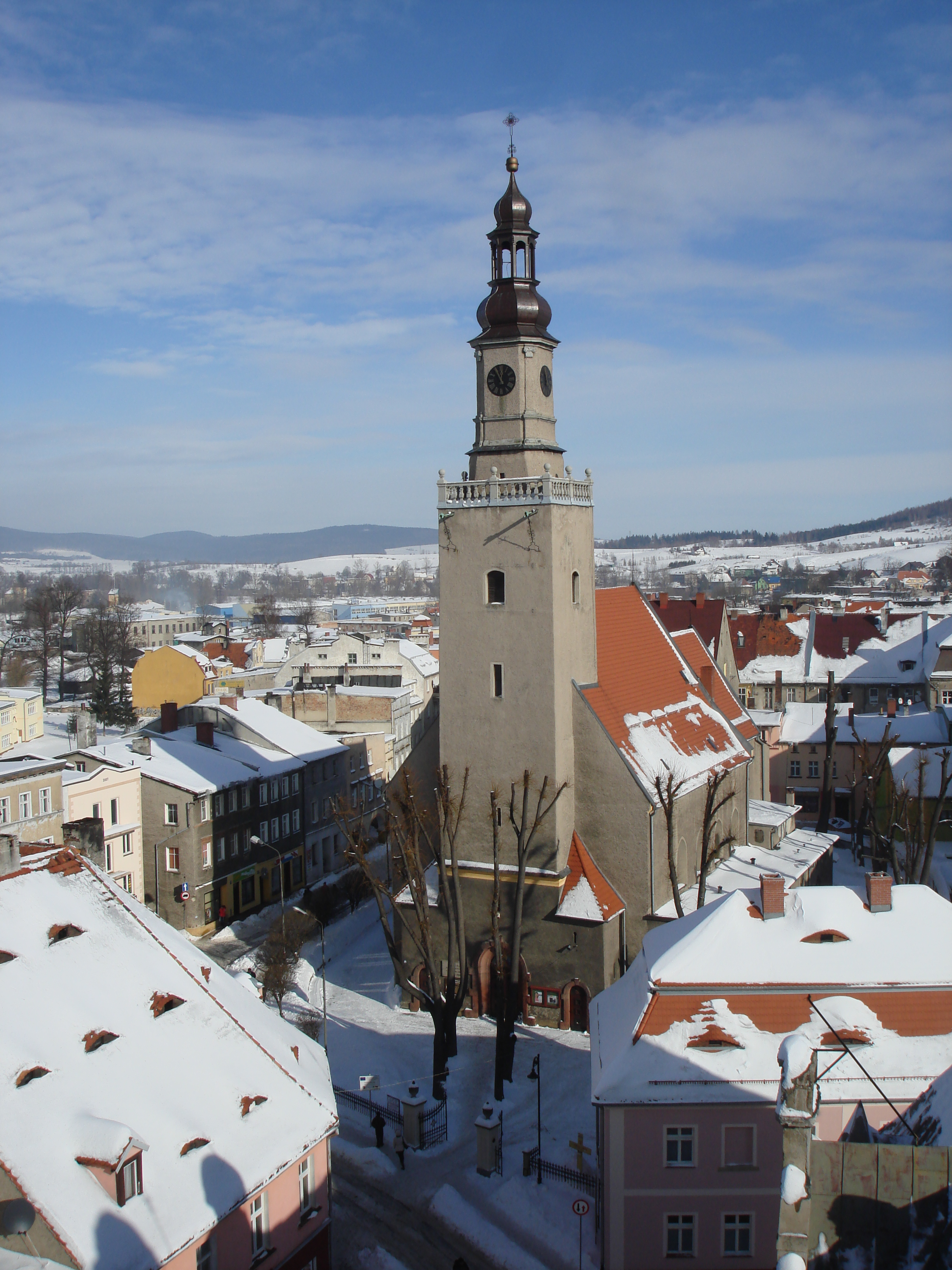 Kamienna Góra, ul. Mickiewicza - rzymskokatolicki kościół parafialny p.w. śś. Piotra i Pawła, XVI